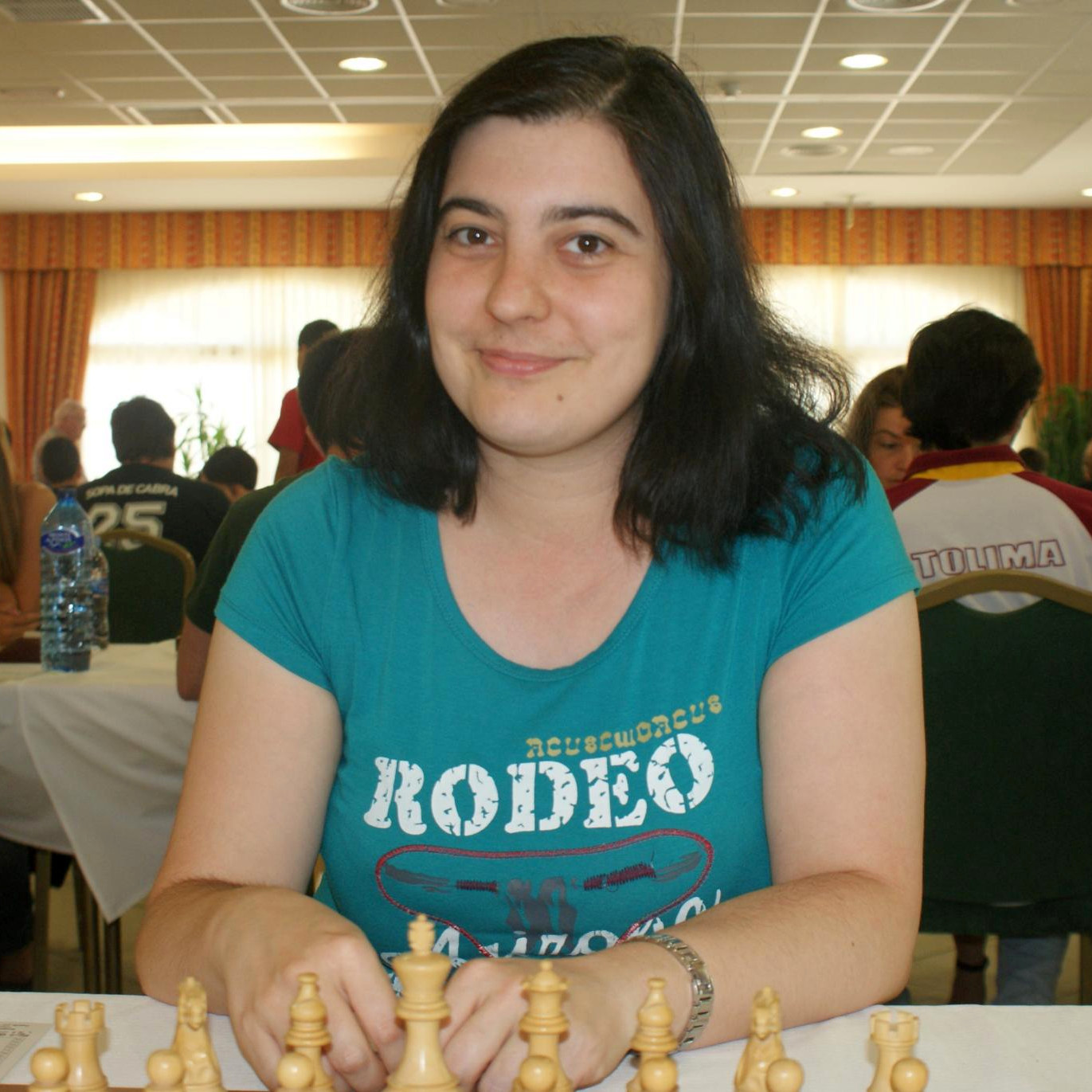 Patricia Llaneza Vega, 30 Open Internacional d'Andorra, Hotel Sant Gothard, Ronda 6 - 26/07/2012